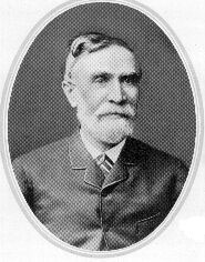 Lars Lange (1826-1890), dansk fabrikant og medlem af Svendborg byråd.